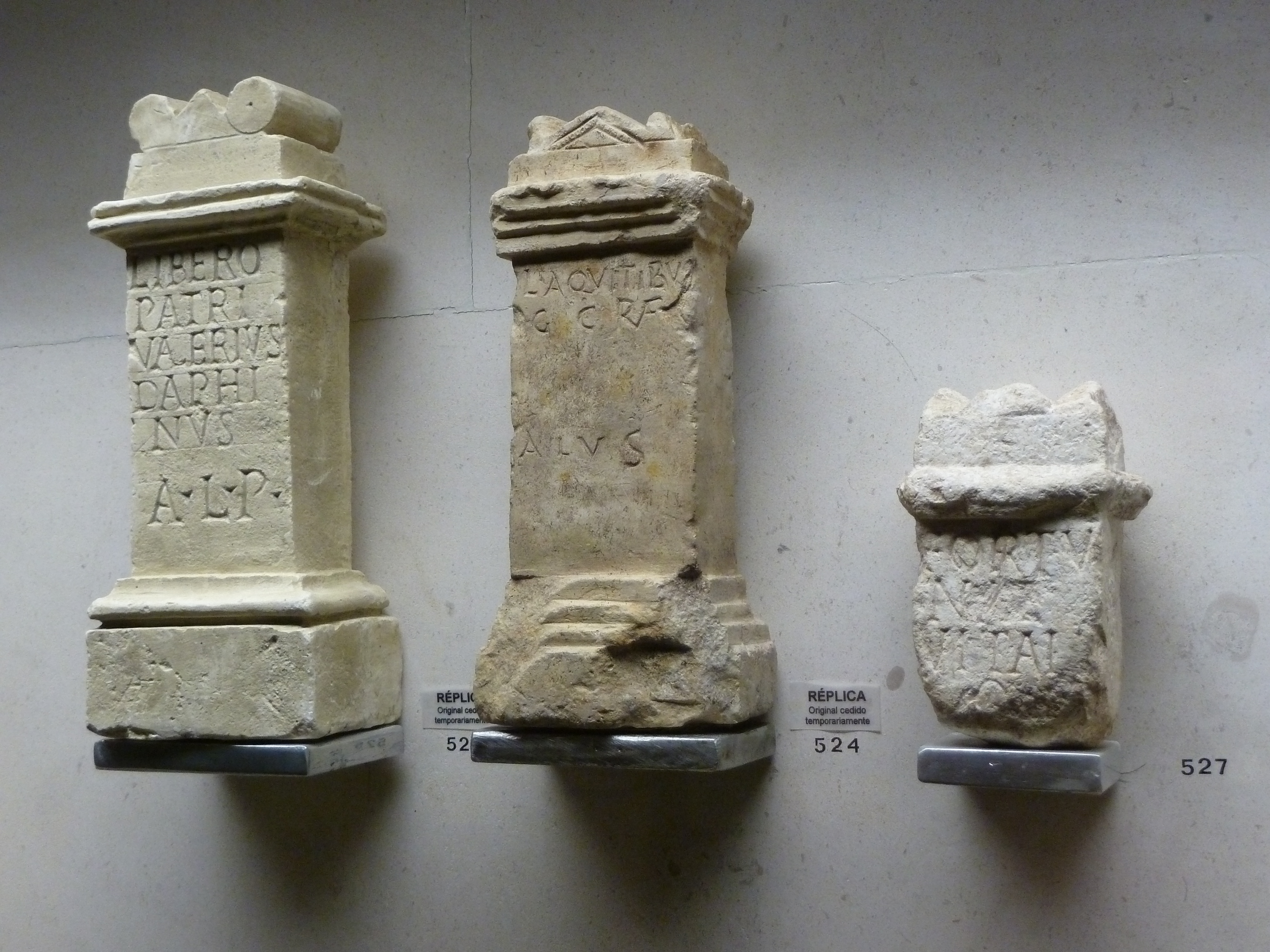 Aras votivas romanas procedentes de Conimbriga, depositadas en el Museo Monográfico de Conimbriga (Condeixa-a-Nova, Portugal), correspondientes con: Conimbri 13: Libero/ Patri/ Valerius/ Daphi/nus/ a(nimo / l(ibens)/ p(osuit) AE 1989, 375: L(aribus) Aquitibu(s)/ G(aius) C(aecilius) Ruf[u]s/ a(nimo) l(ibens) v(otum) s(olvit) Conimbri 4: Fortu/nae Vitali/o [v(otum) s(ovit?)]